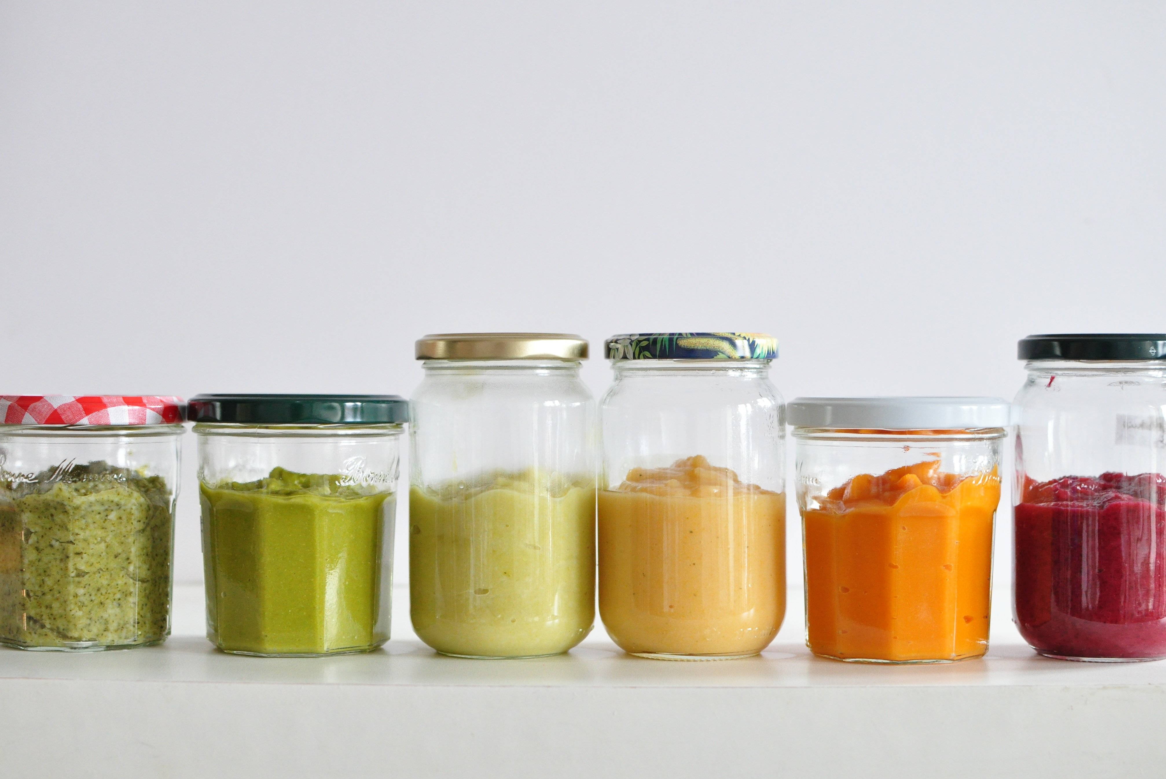 Made 18 of these, they're in the freezer. Now I don't have to worry about baby's lunch for the 3 coming weeks. Arc-en-ciel 18 pots de purée au congélateur : plus de soucis pour le déjeuner de bébé des 3 prochaines semaine. De gauche à droite : brocolis/vermicelles ; courgette/haricots verts/poireau/pomme de terre ; poireau/riz ; navet, carotte, pomme de terre ; carotte/semoule ; betterave/pomme de terre.